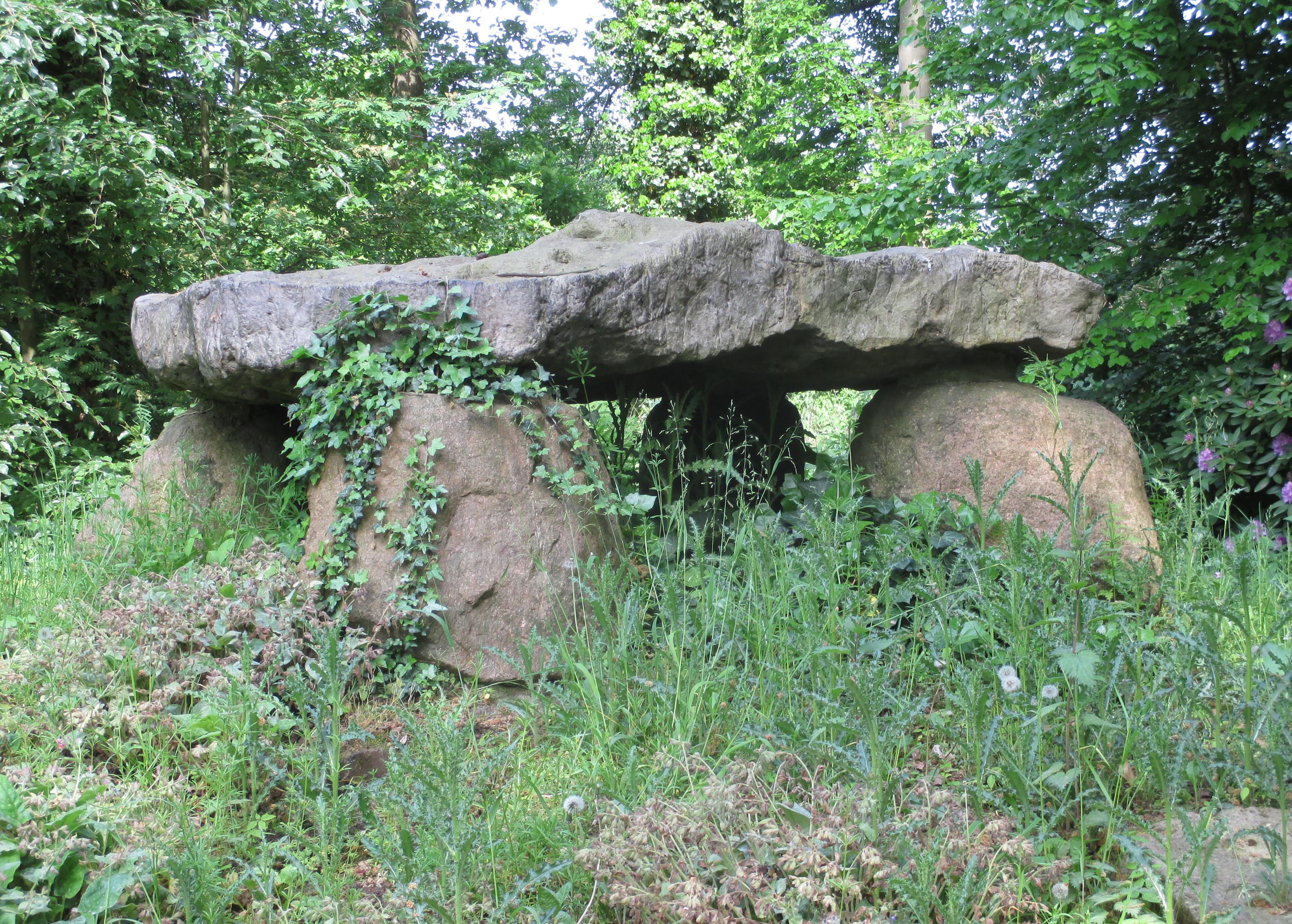 Das Hünengrab auf dem Ehrenfriedhof Uhlenhorst erinnert an die Opfer des 1. Weltkriegs. Es besteht aus 5 Findlingen mit den Abmessungen 220 cm x 180 cm x 30 cm (Quarzit), 75 cm x 25 cm x 50 cm (2 Stück), 45 cm x 45 cm x 50 cm (2 Stück).